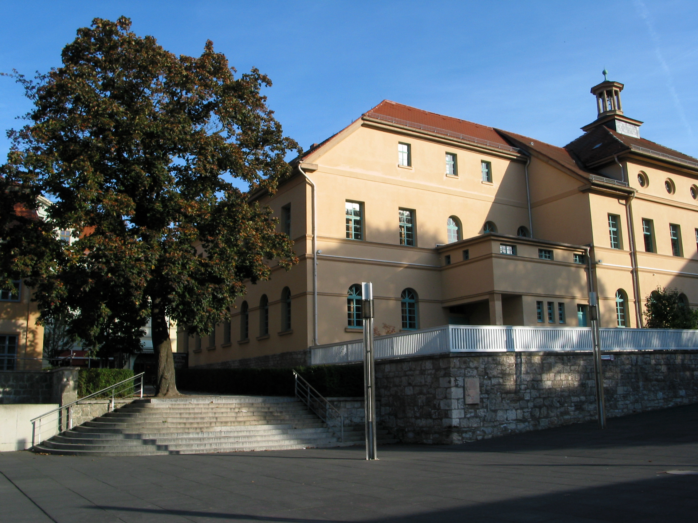 Blick vom UNESCO-Platz auf die Rückseite der ehemaligen Bürgerschule von 1825, heute Städtische Musikschule "Ottmar Gerster".